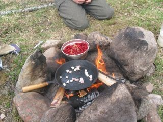 Man bryner fläsket i stekpannan innan man häller på smeten.